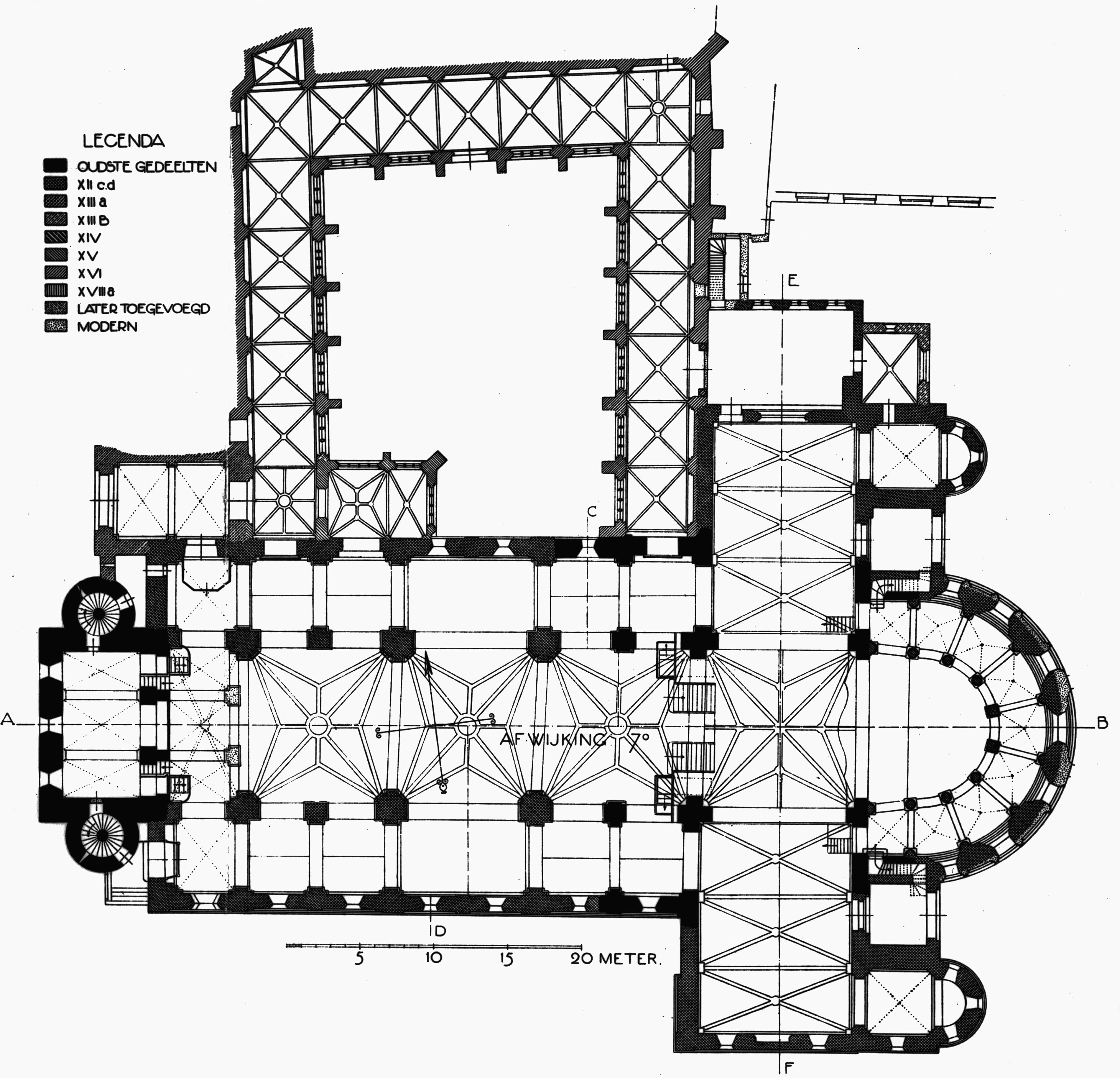 Onze Lieve Vrouwekerk: plattegrond (reproduktie)